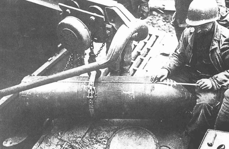 Sturmtiger's 380mm HE rocket, measured by US soldier